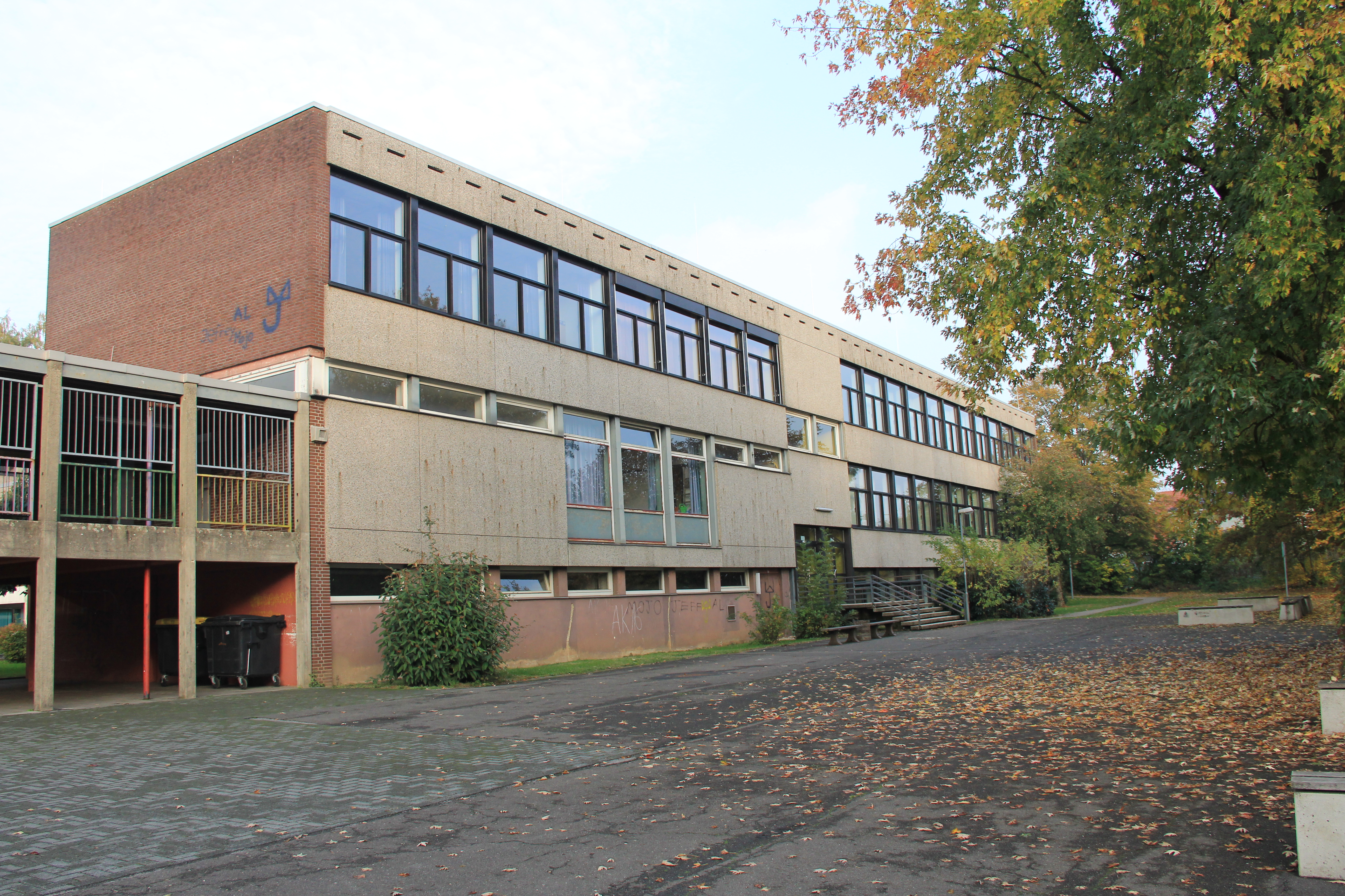 Gelände der Städtischen Realschule Linnich